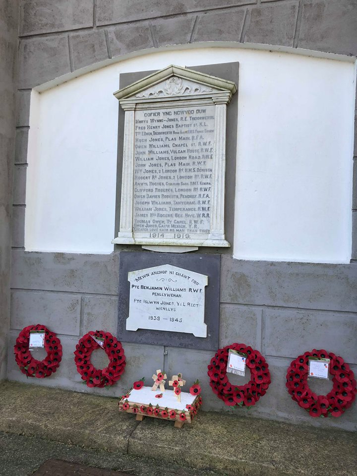 Cofeb ryfel Bodedern